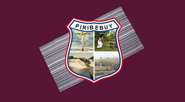 Bandera de Piribebuy